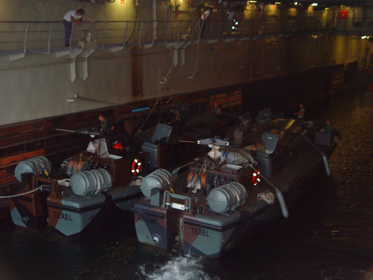 zelfmaak